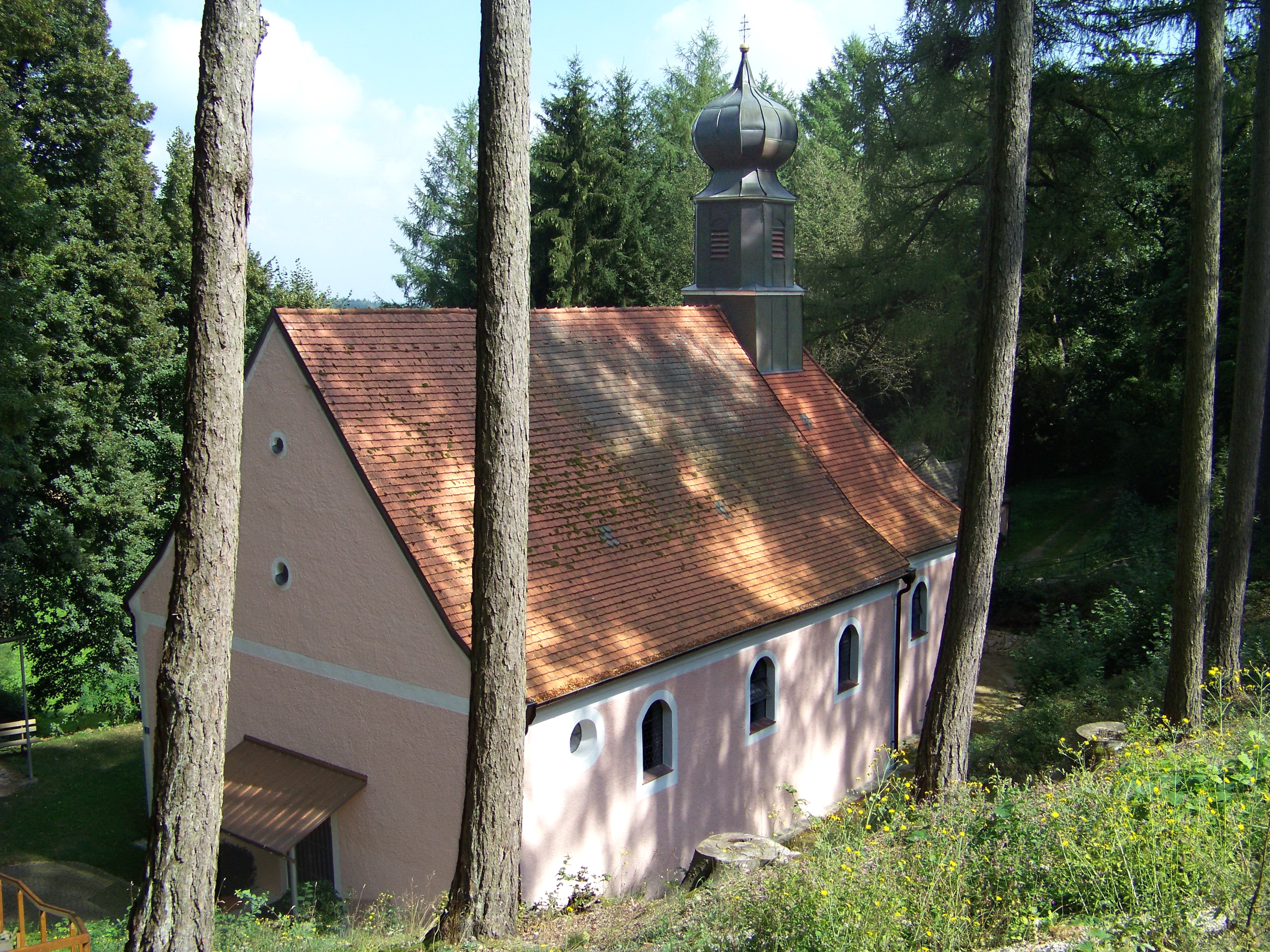 Mariabrünnl, Kapelle Mariä Heimsuchung, sog. Brünnlkapelle von 1788